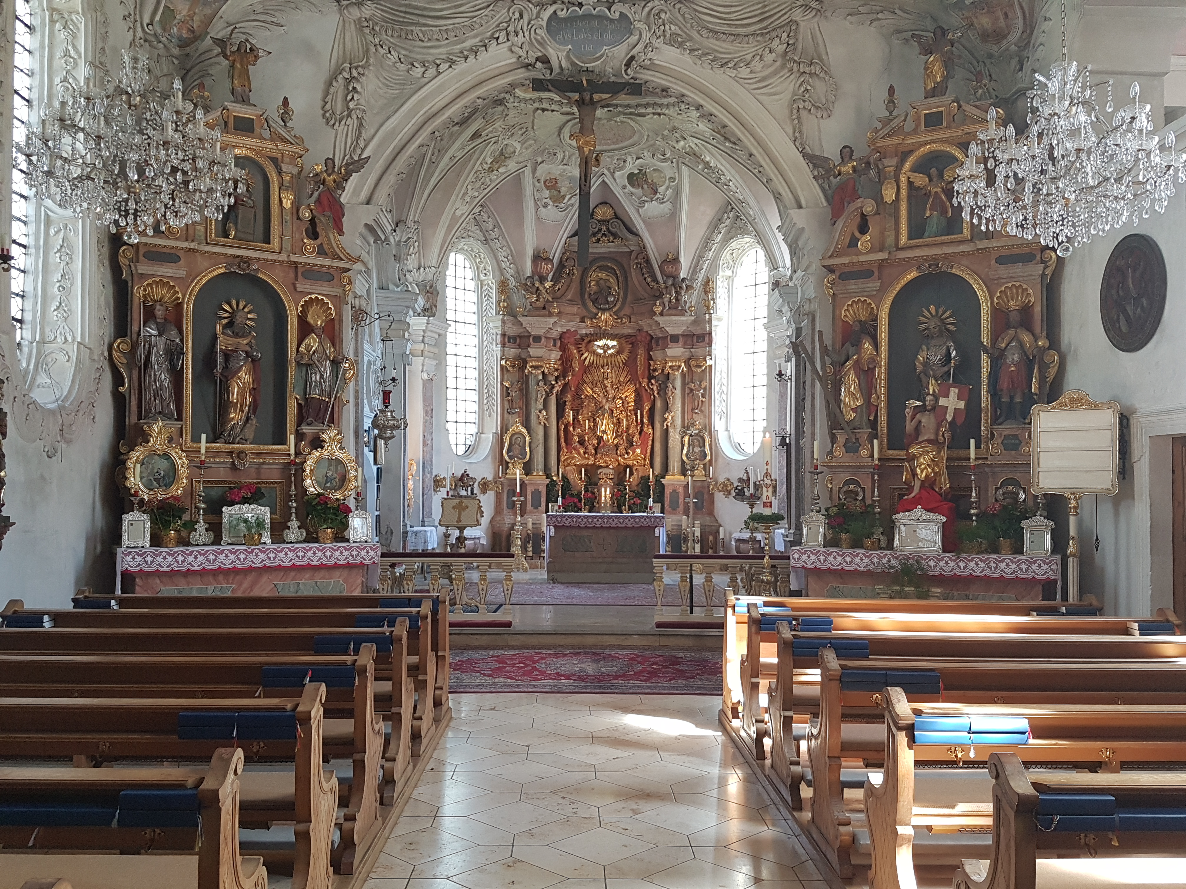 Wallfahrtskirche Maria Altenburg (Moosach), Innenraum mit Blick zum Chor